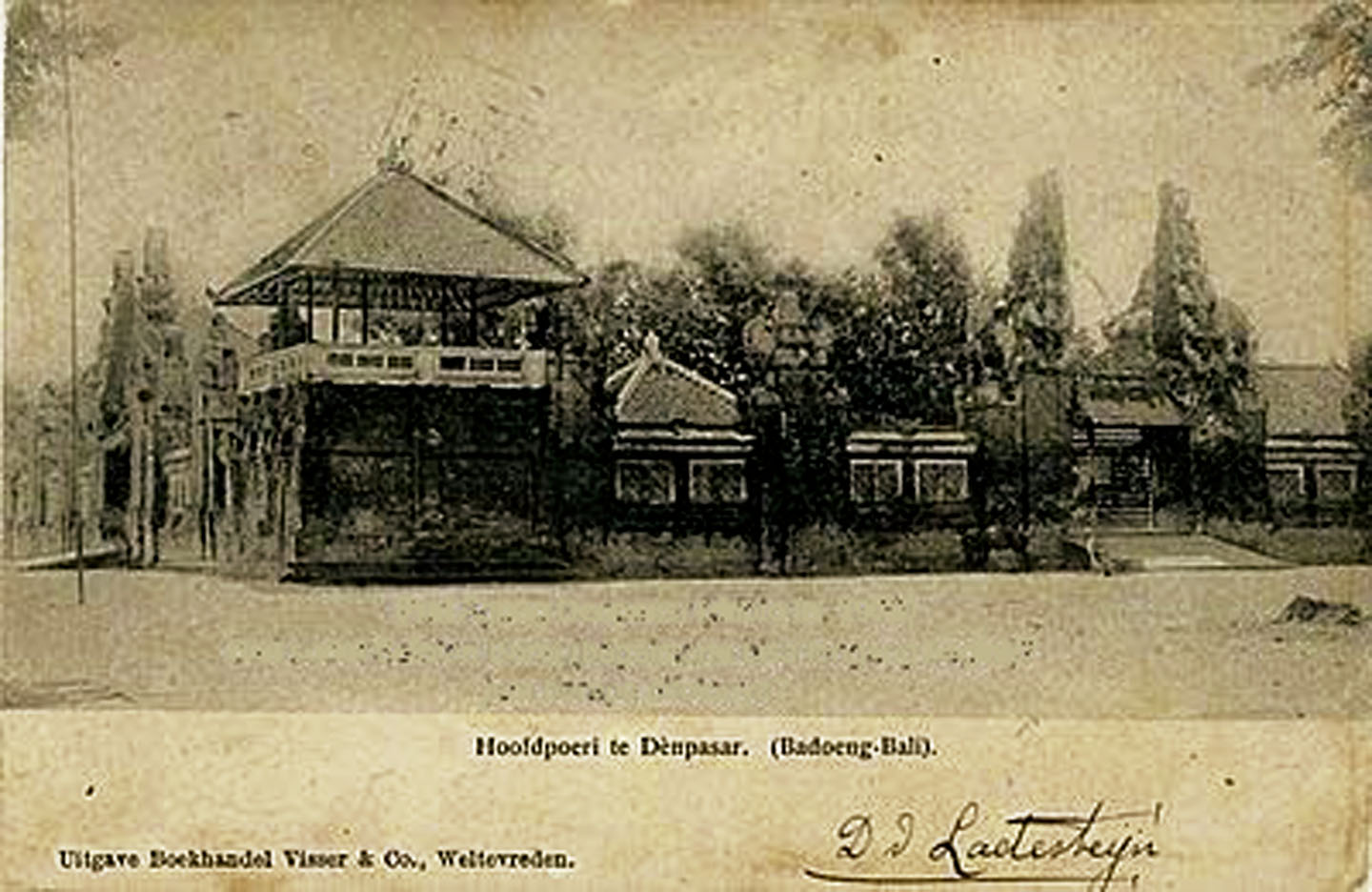 Foto Gerbang Utama Keraton Puri Agung Denpasar sebelum perang Puputan Badung 20 September 1906